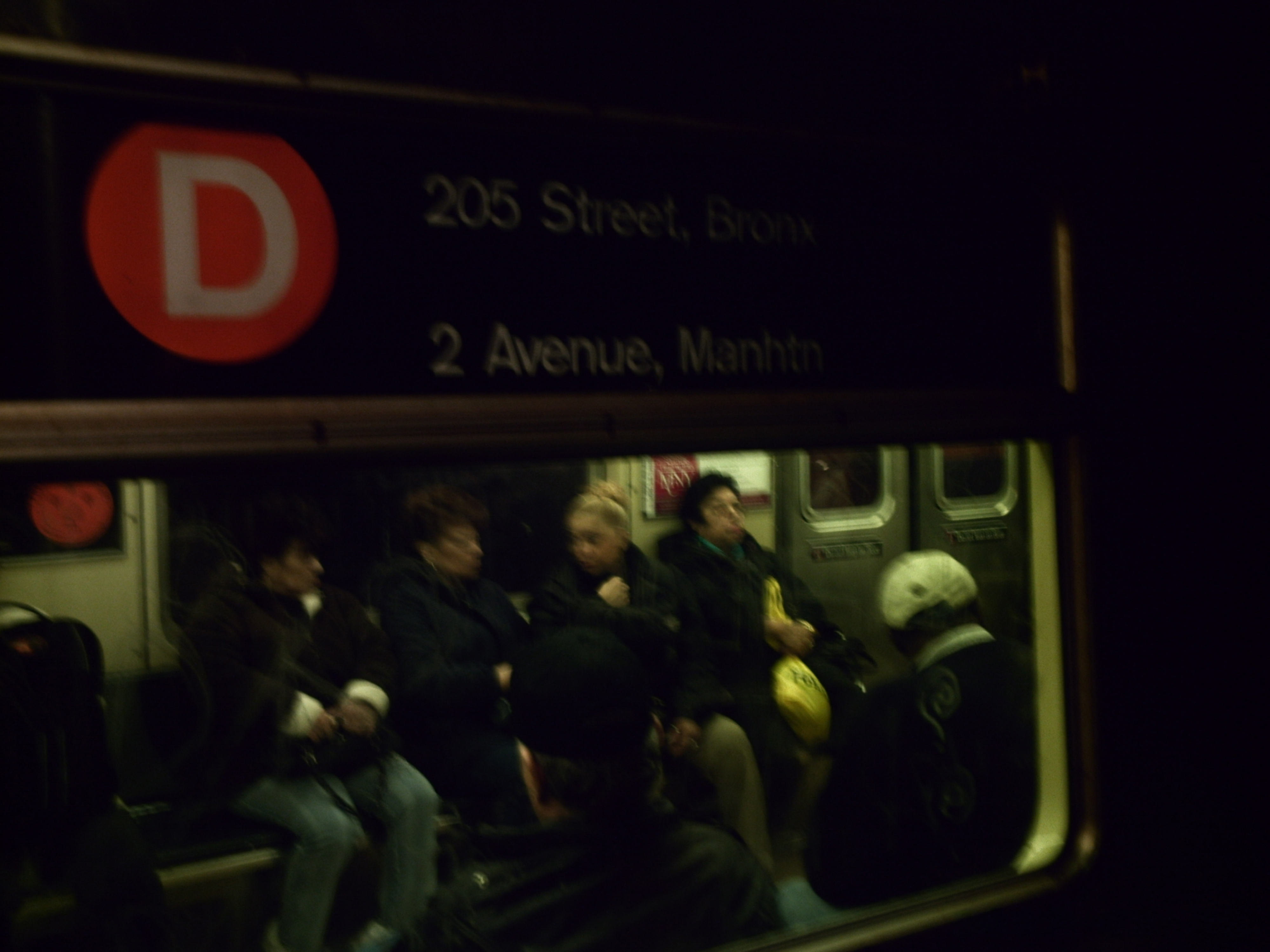 Tren modelo 340 del metro de NY